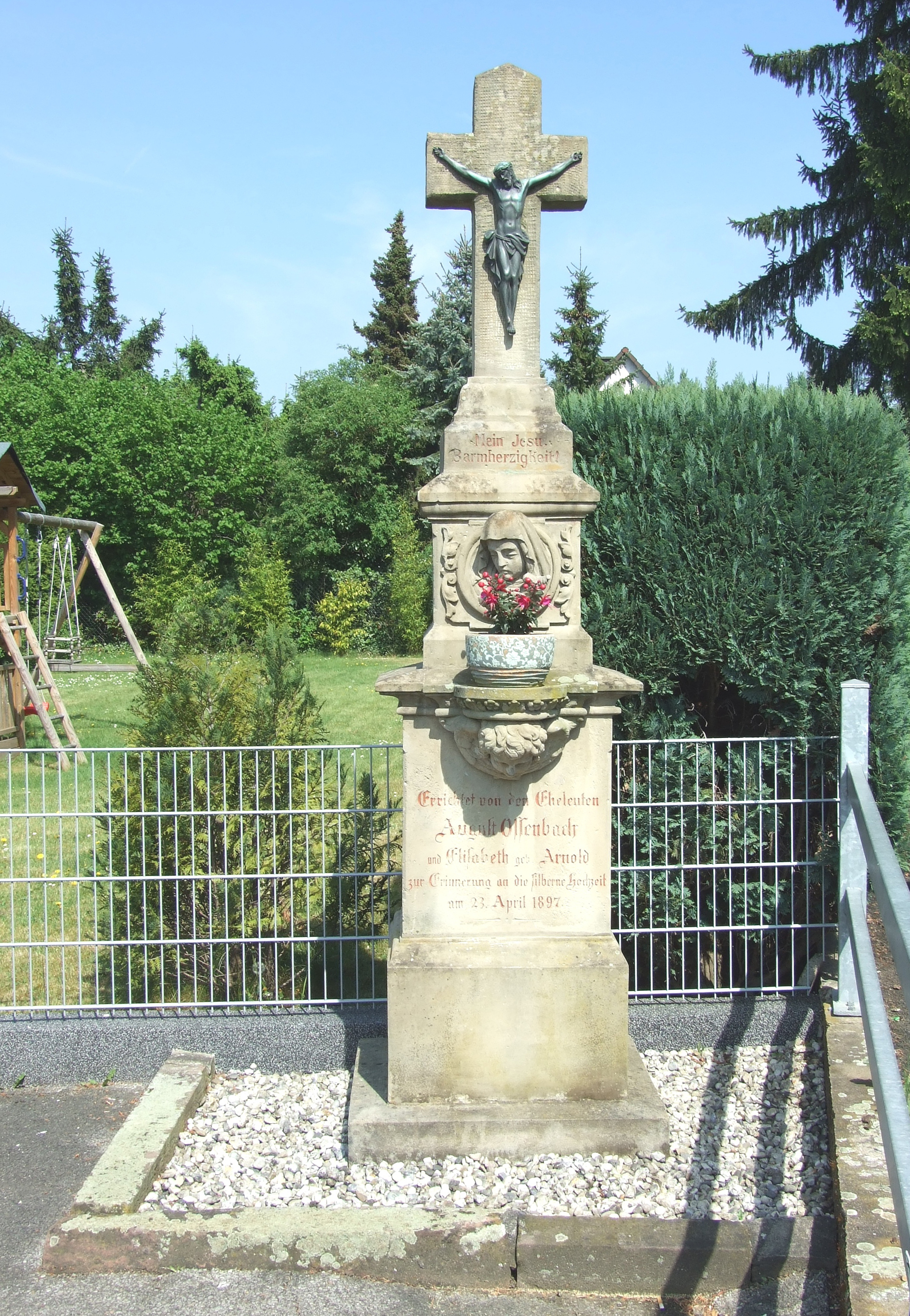 Bergisch Gladbach, Denkmal Nr. 67